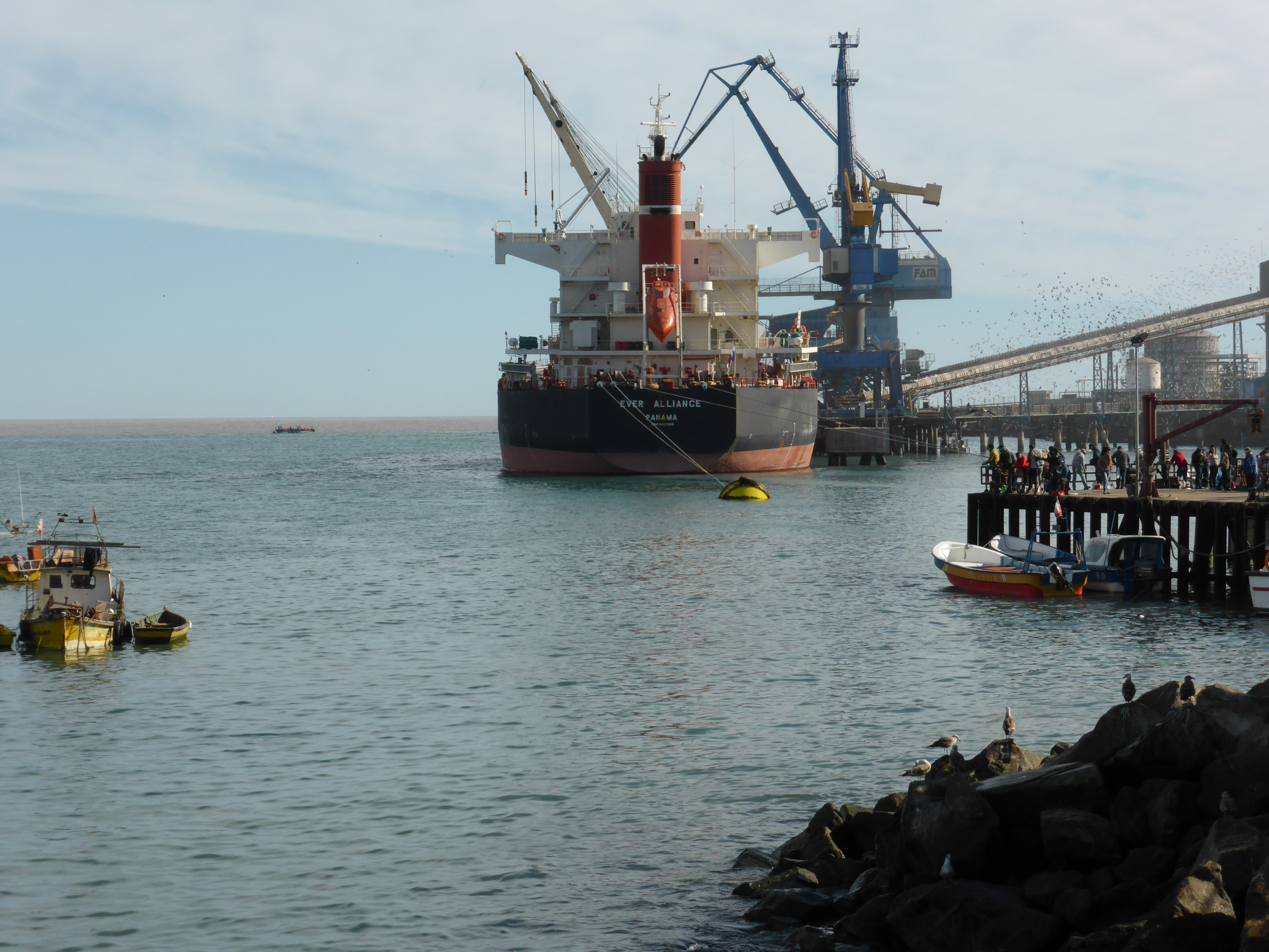 Buque granelero (bulk carrier ): "EVER ALLIANCE". Bandera de Panamá, IMO: 9423255, año de construcción: 2011. Eslora (desde la proa hasta la popa): 190 metros. Posición el 4 de junio de 2016: San Antonio (Chile), Región de Valparaíso.